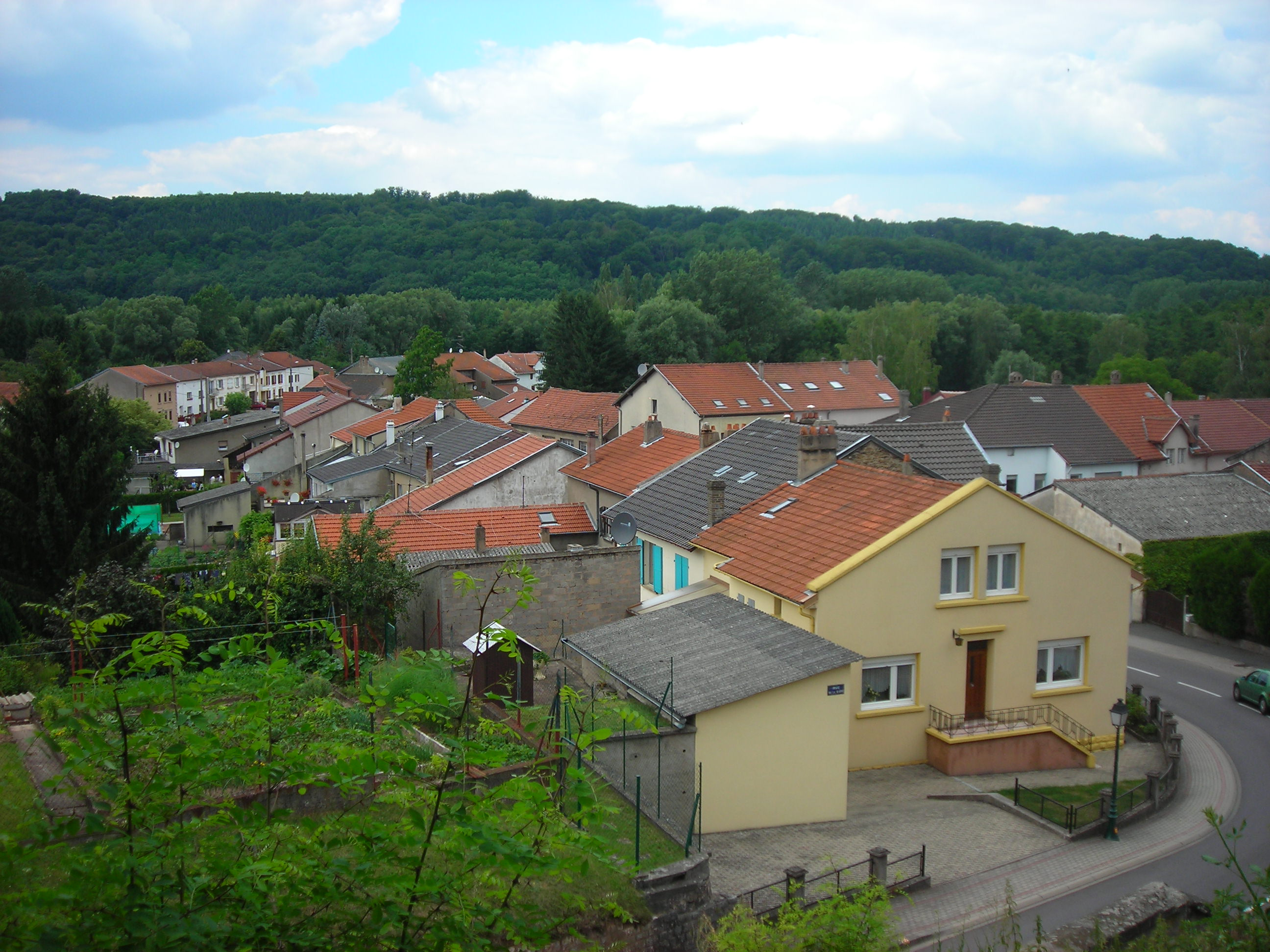 Village de Falck (France) depuis l'église St. Brice